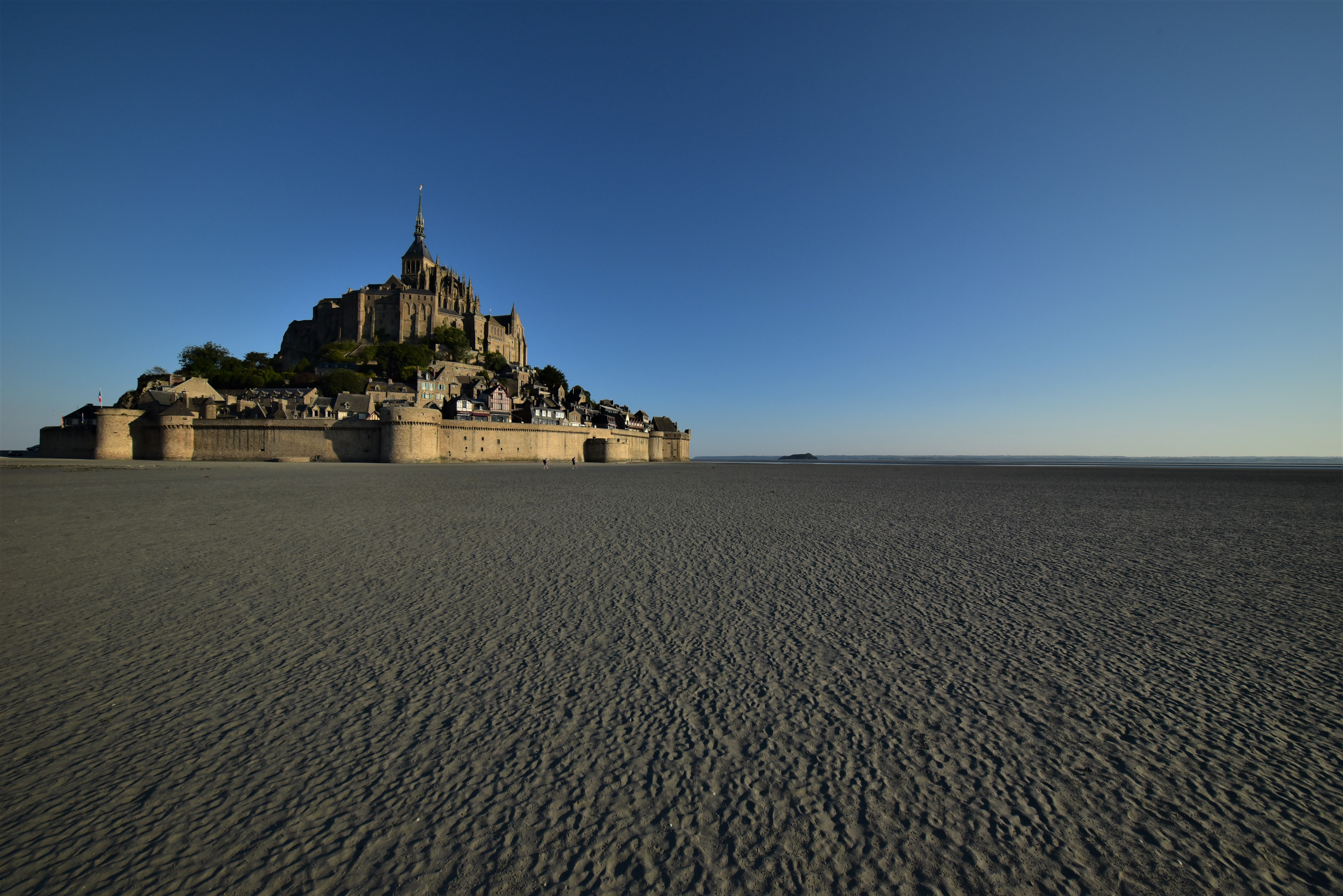 Beispielfoto: Mt St Michel, aufgenommen mit einem 11/f4